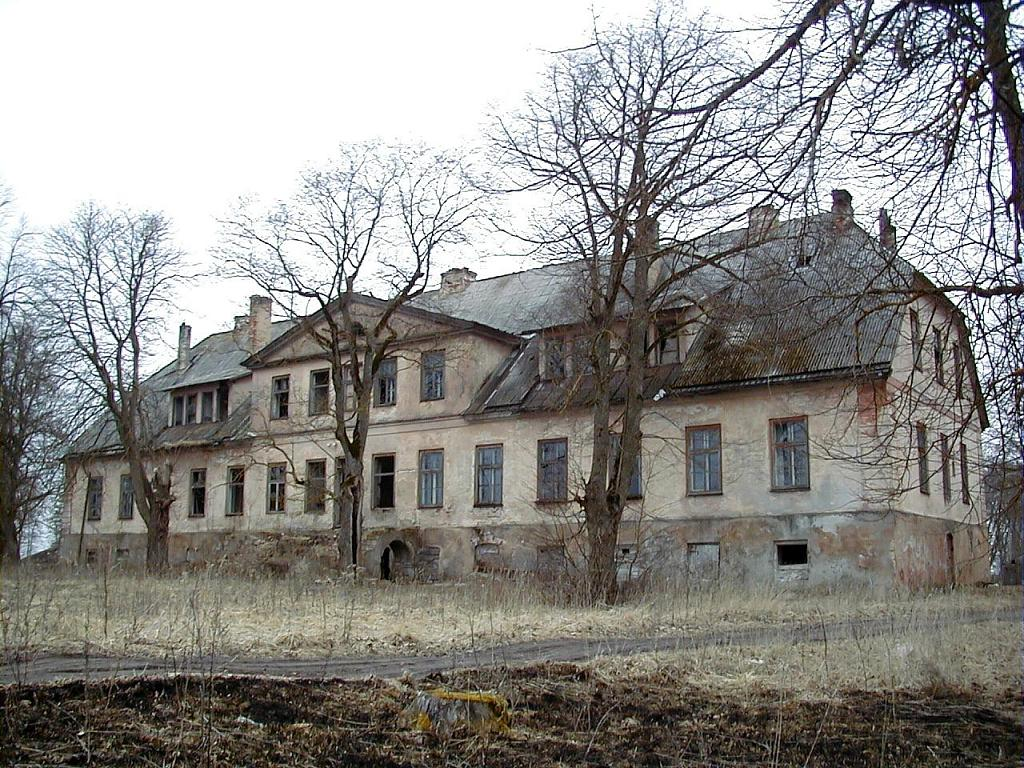 Aizdzires muiža 2001-04-01